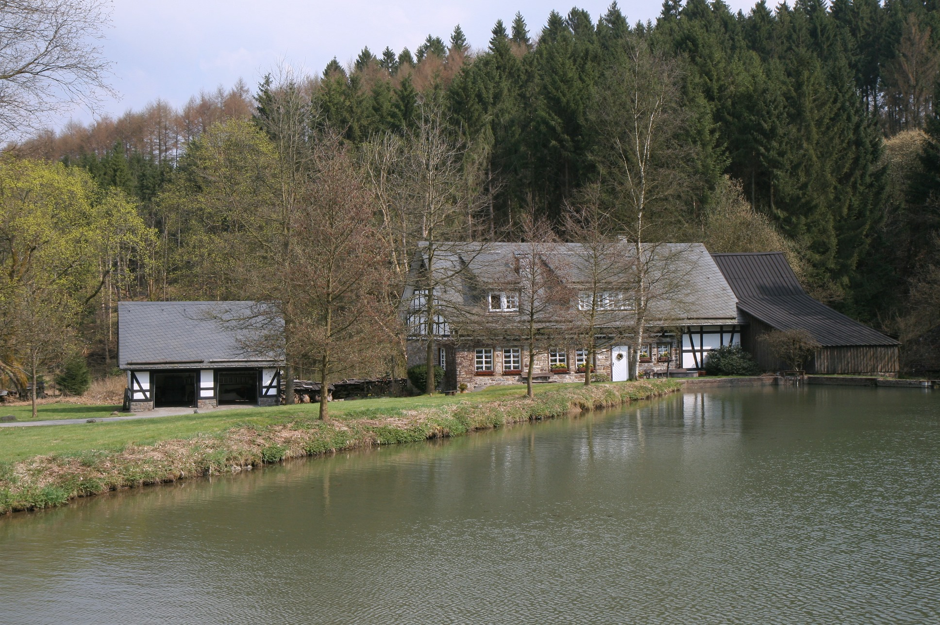 „Eichener Mühle“ in Drolshagen-Eichenermühle. Die Eichener Mühle steht unter Denkmalschutz und befindet sich in Privatbesitz.